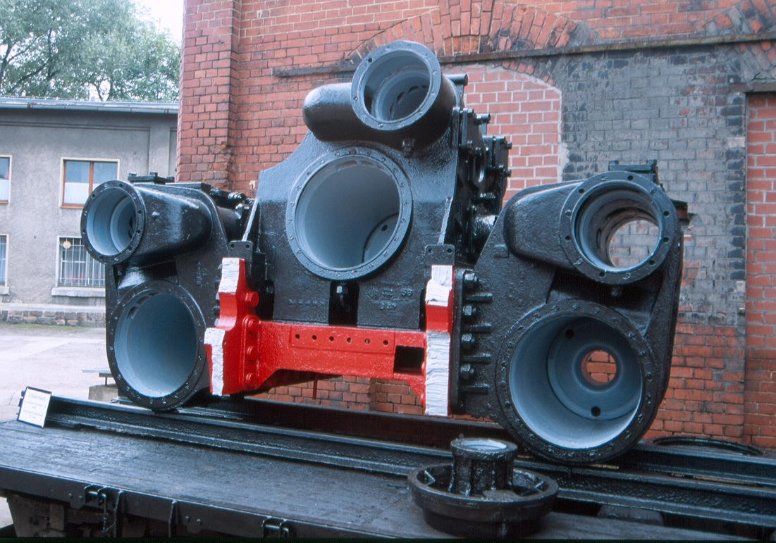 Zylinder der Dampflok der Baureihe 44 im Sächsisches Eisenbahnmuseum.